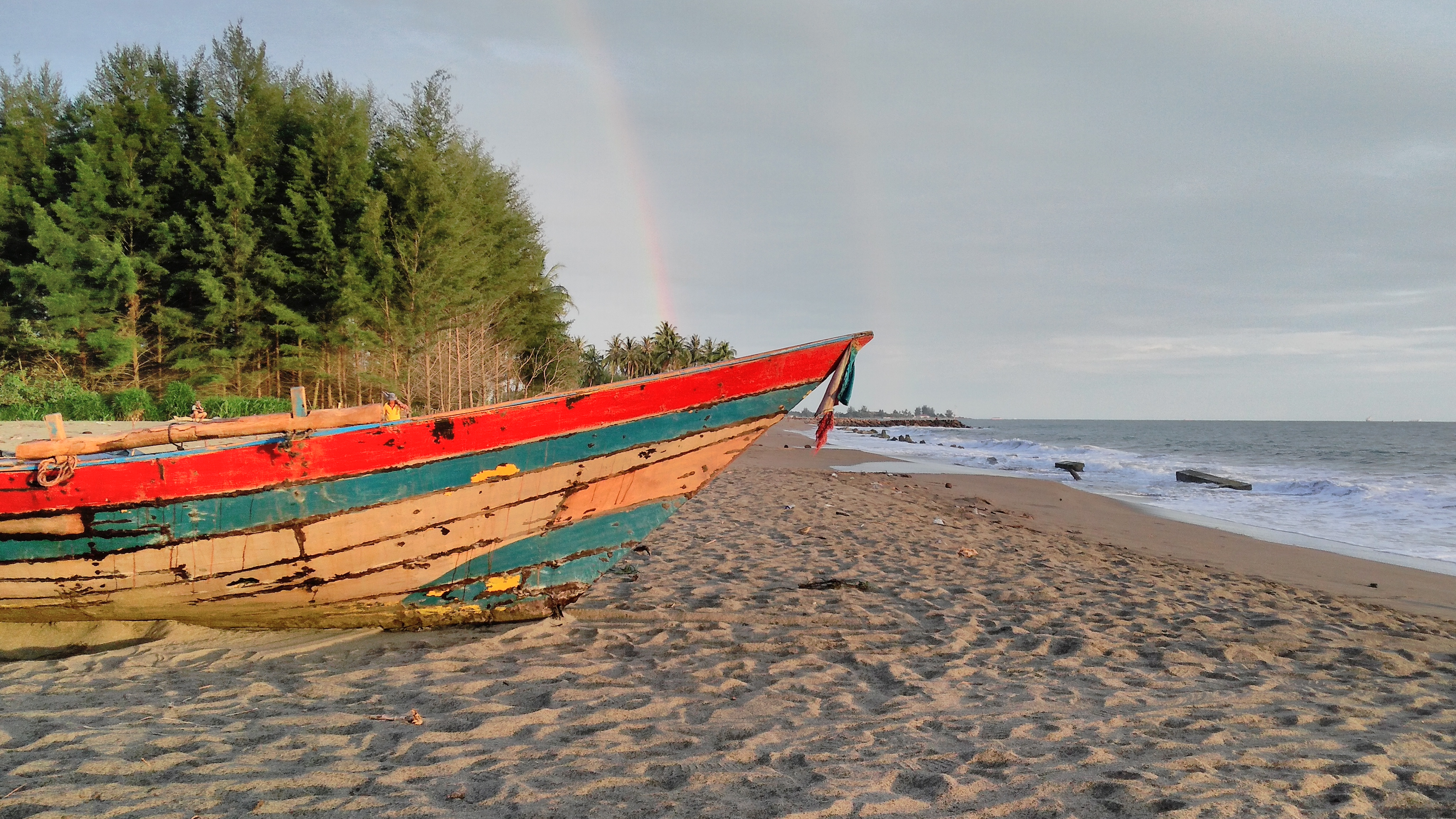 Pemandangan indah disertai pelangi di sore hari di pantau meulaboh - Aceh